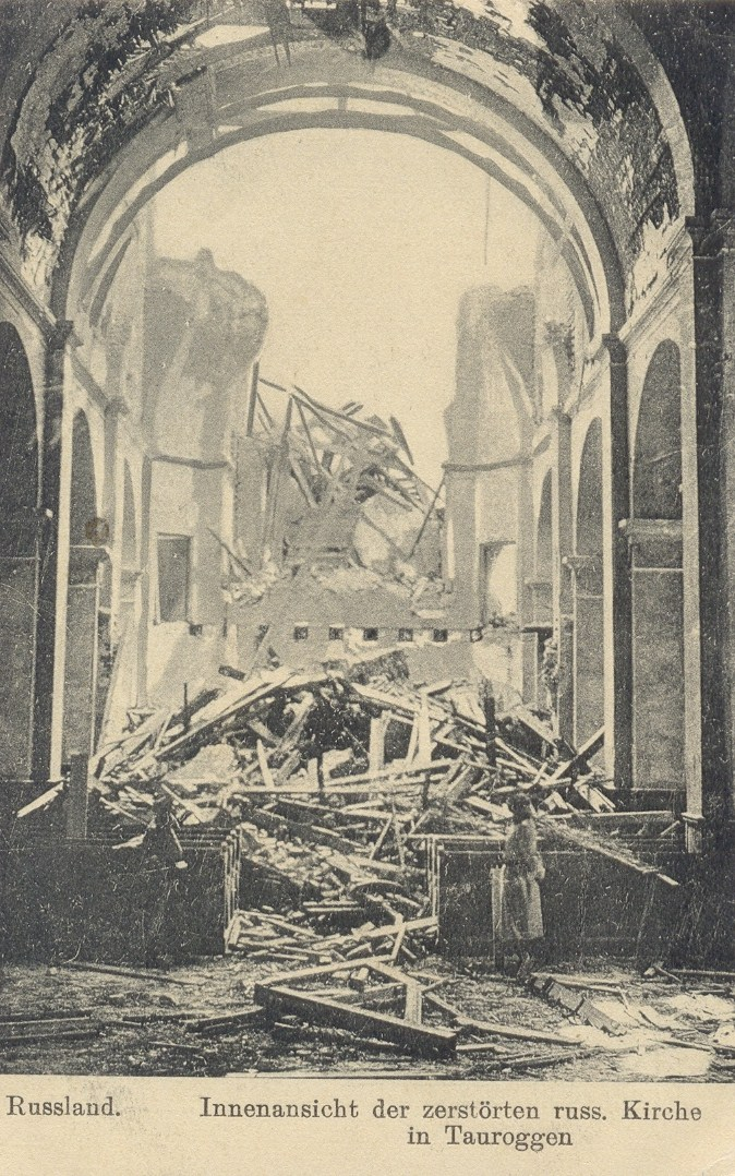 Надписи под изображением (на лицевой стороне открытки): «Russland. Innenansicht der zerstörten russ. Kirche in Tauroggen». Надпись на оборотной стороне открытки: «Verlag H. Barsuhn, Tilsit».